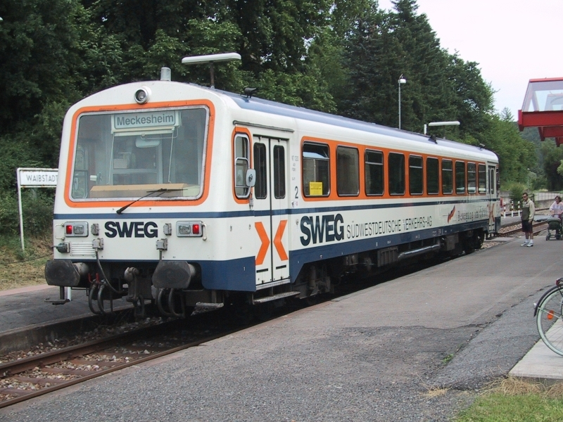 SWEG VT 120 im Bahnhof Waibstadt.